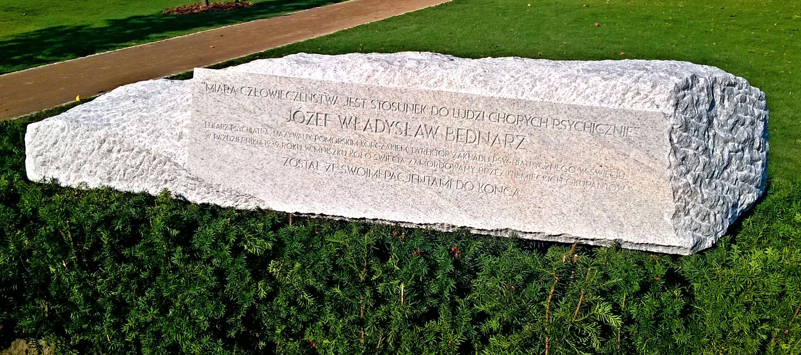 Pomnik Ofiar Zbrodni Pomorskiej 1939 w Toruniu4